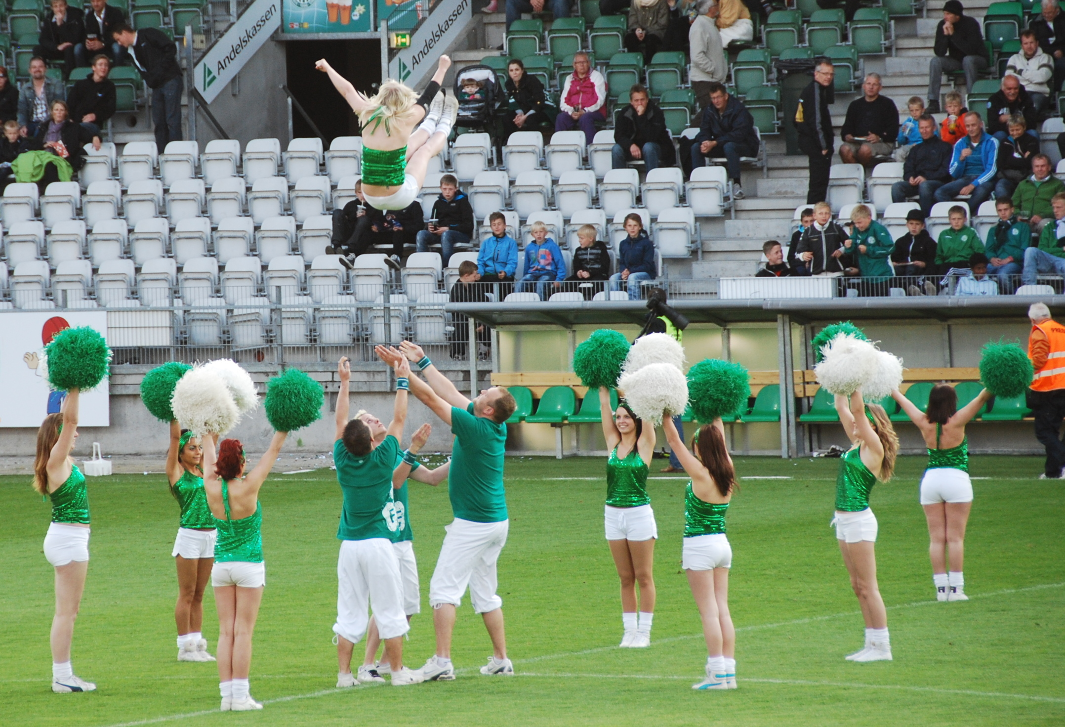 Cheerleaders fra Viborg FF. Her i pausen ved 1. divisionskampen mod Hobro IK på Viborg Stadion.